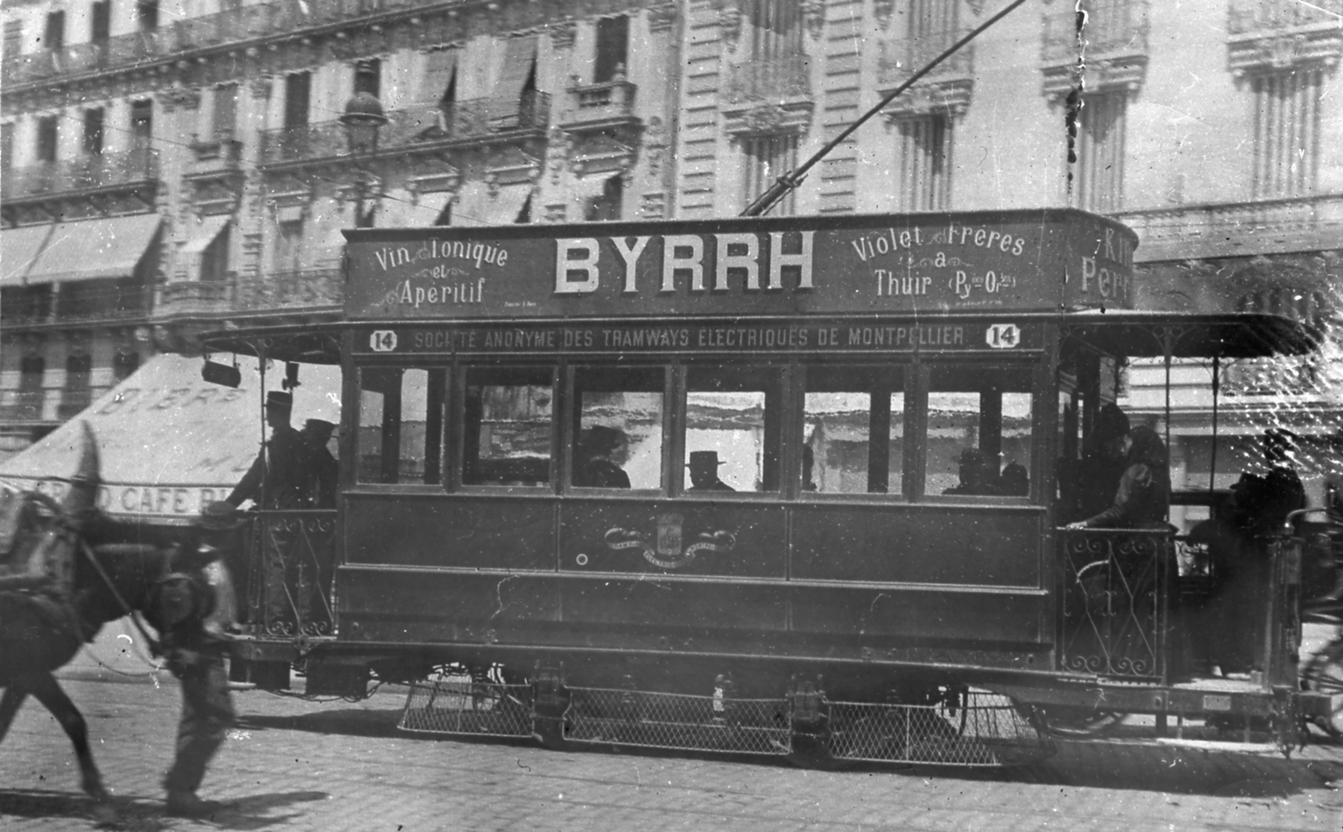 Transports en commun de Montpellier - Place de la Comédie - Motrice Brill vue dans les années 1910.